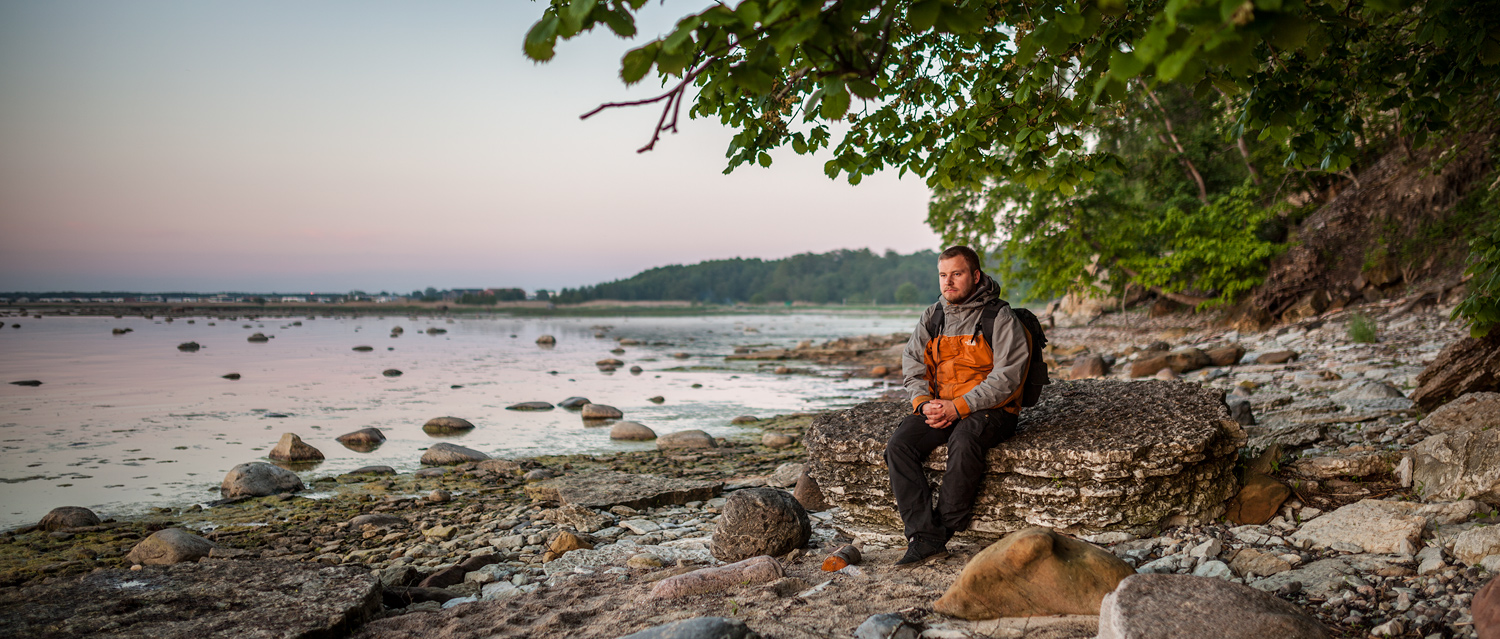 Tõnis Tuuga